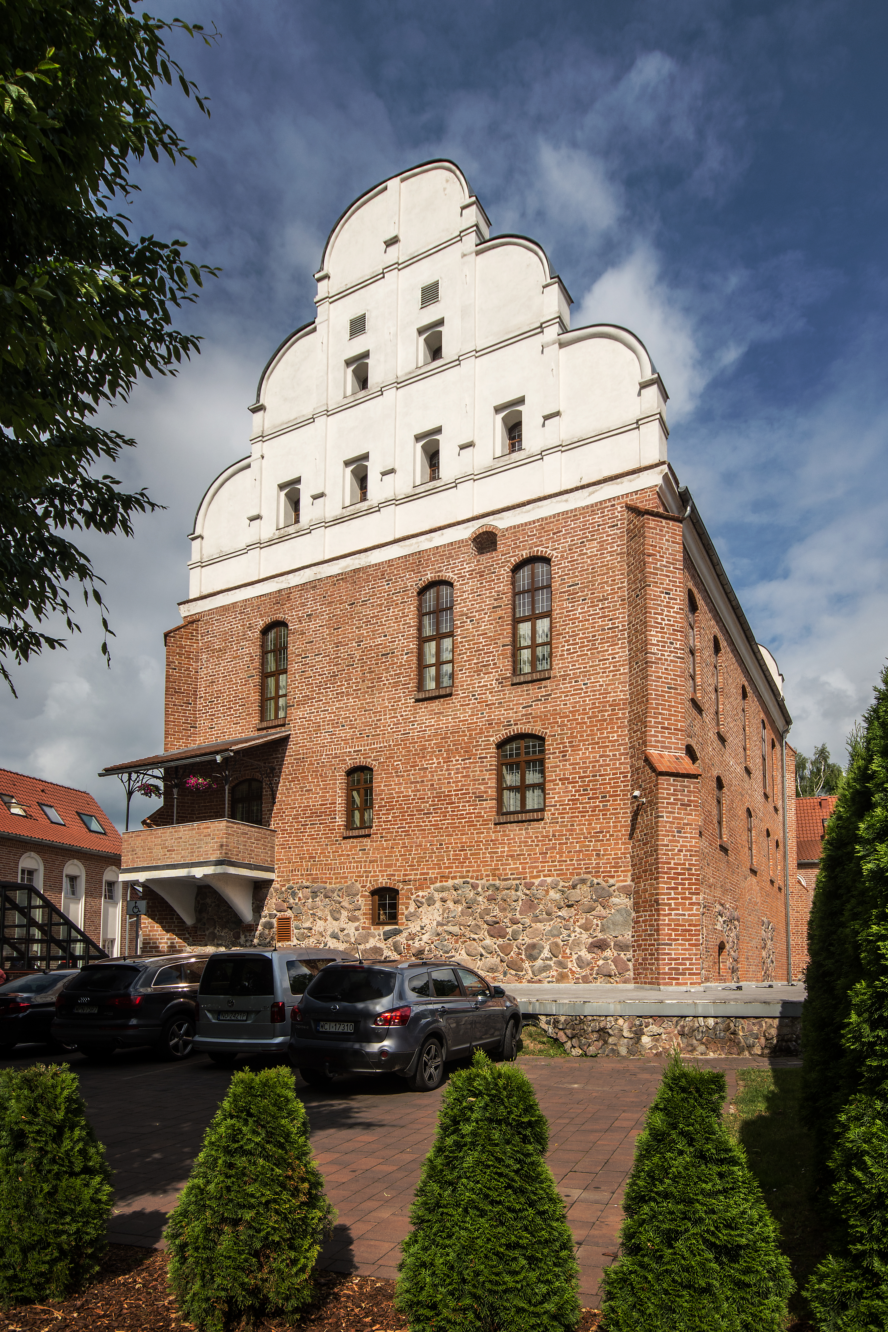 Giżycko, zamek zakonny - zachowane skrzydło, XIV - 2 poł. XIX Wikidata has entry 645478 with data related to this item.